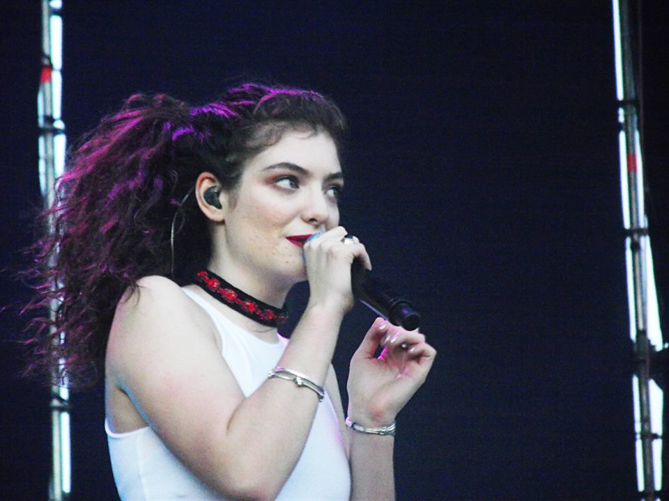 Imágenes tomadas por mi en el Lollapalooza Argentina